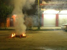 Fin de año en Jaltipan